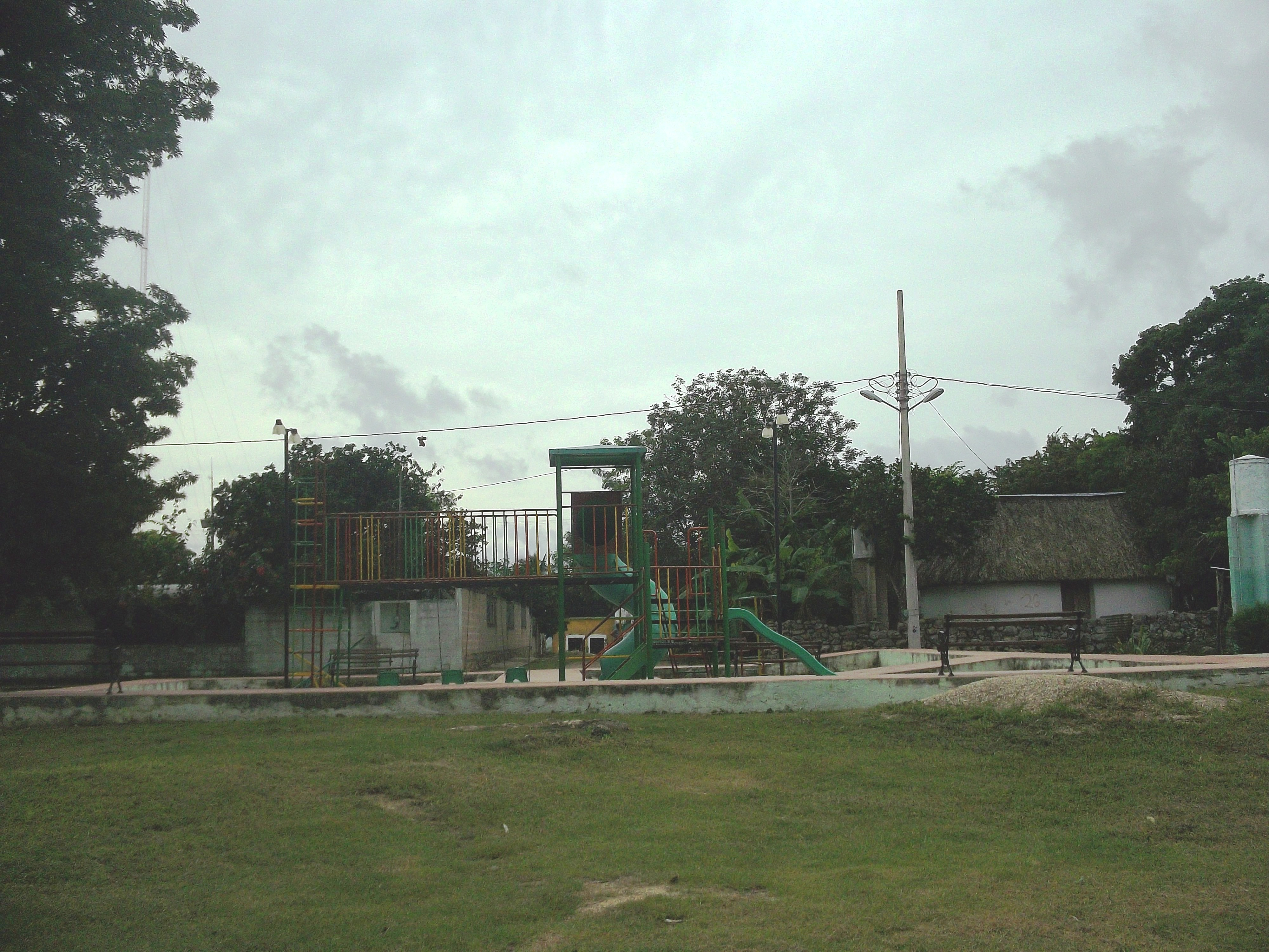 Parque principal de Itzincab Cámara, Yucatán.